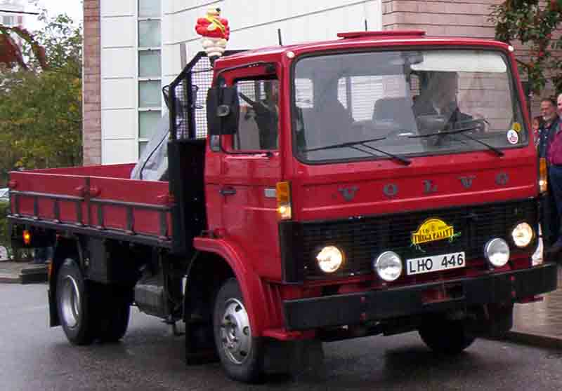 Volvo F407 Truck 1977